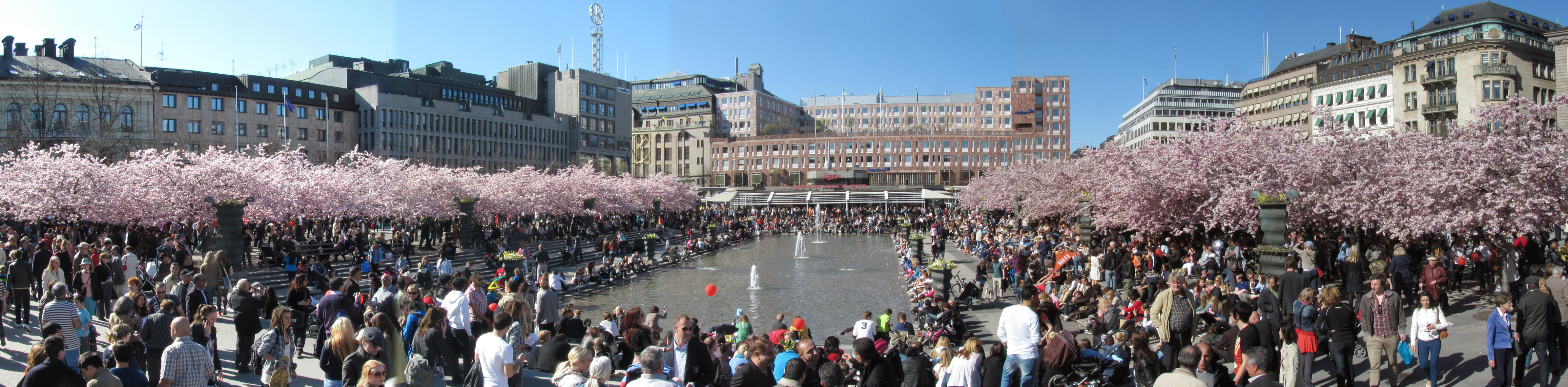 Kungsträdgården 1 maj 2012